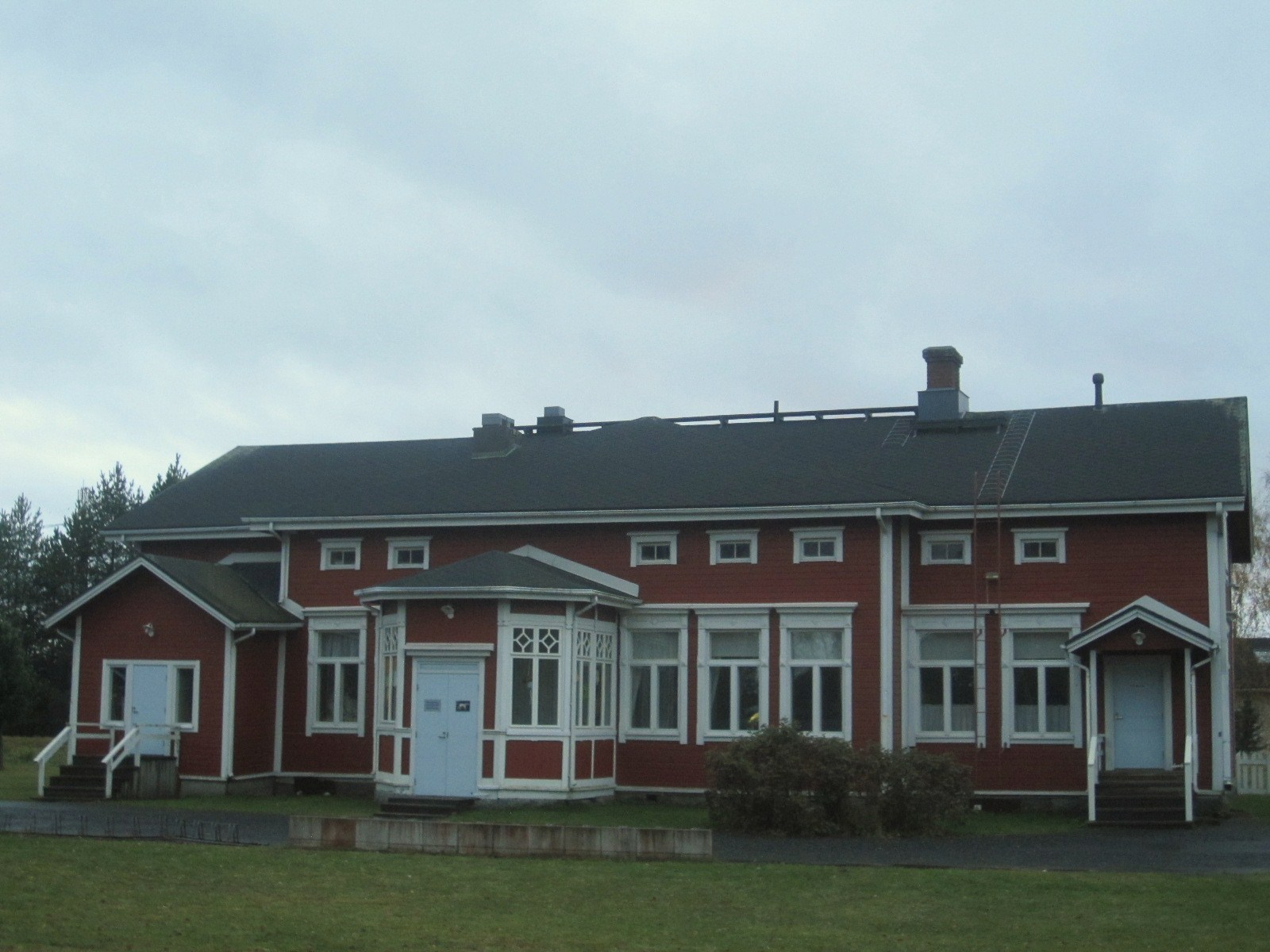 Kempeleen järjestyksessään kolmas vuonna 1899 rakennettu pappila, joka nykyään tunnetaan paremmin Kempeleen vanhana pappilana.